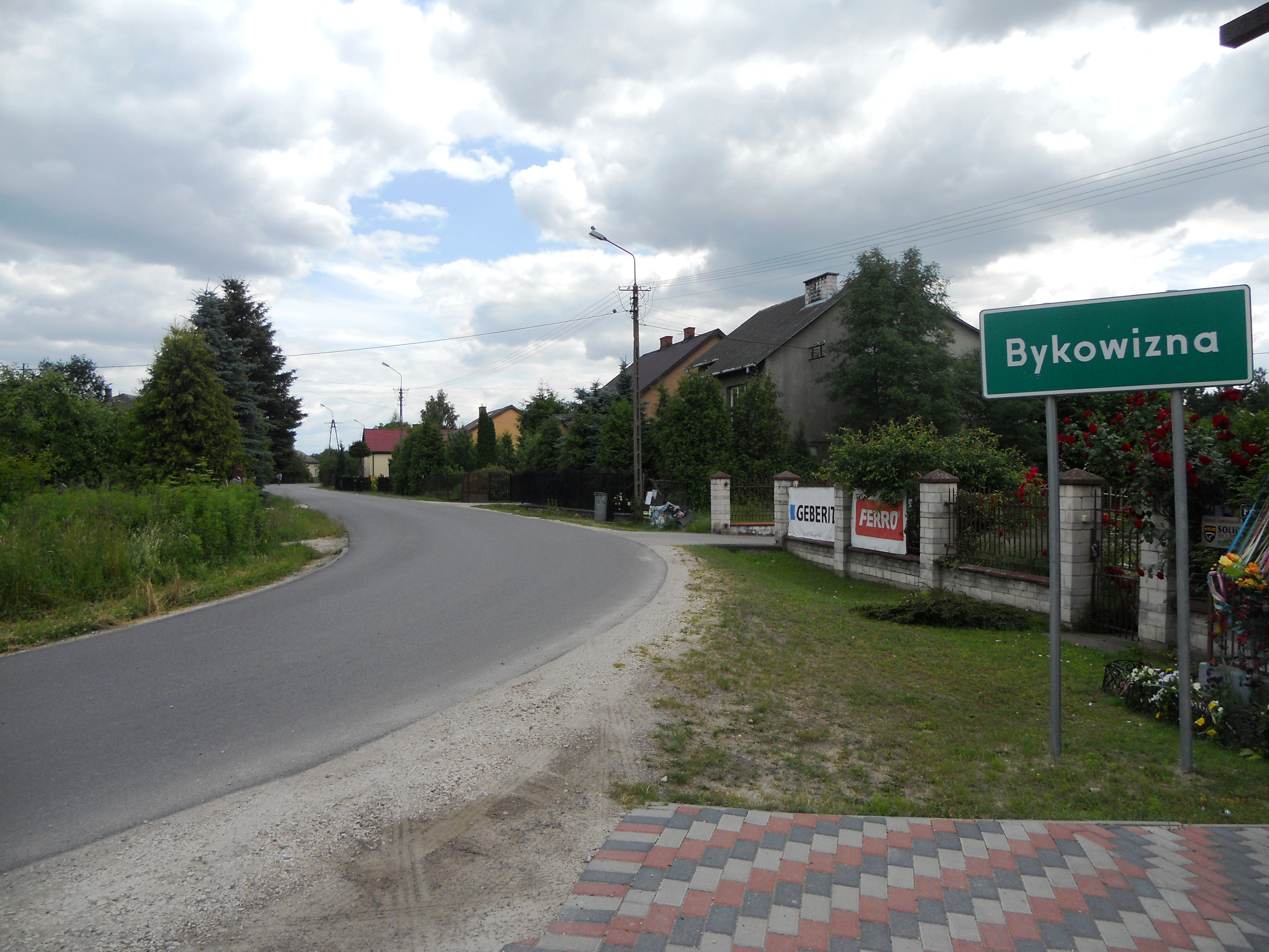 Miejscowość w gminie Dębe Wielkie